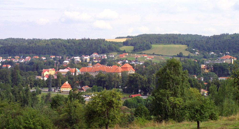 Pohled na střed Plas od jihovýchodu s dominantním areálem kláštera.